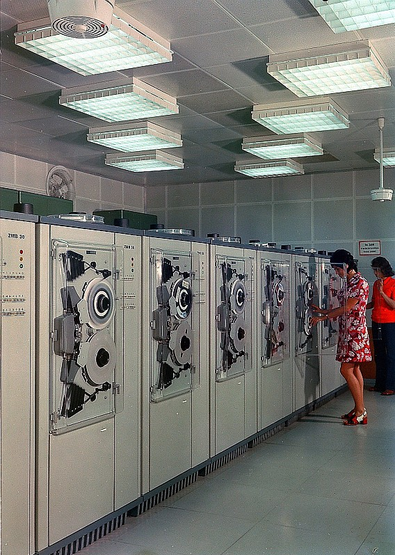 Original image description from the Deutsche Fotothek Facharbeiter für Datenverarbeitung